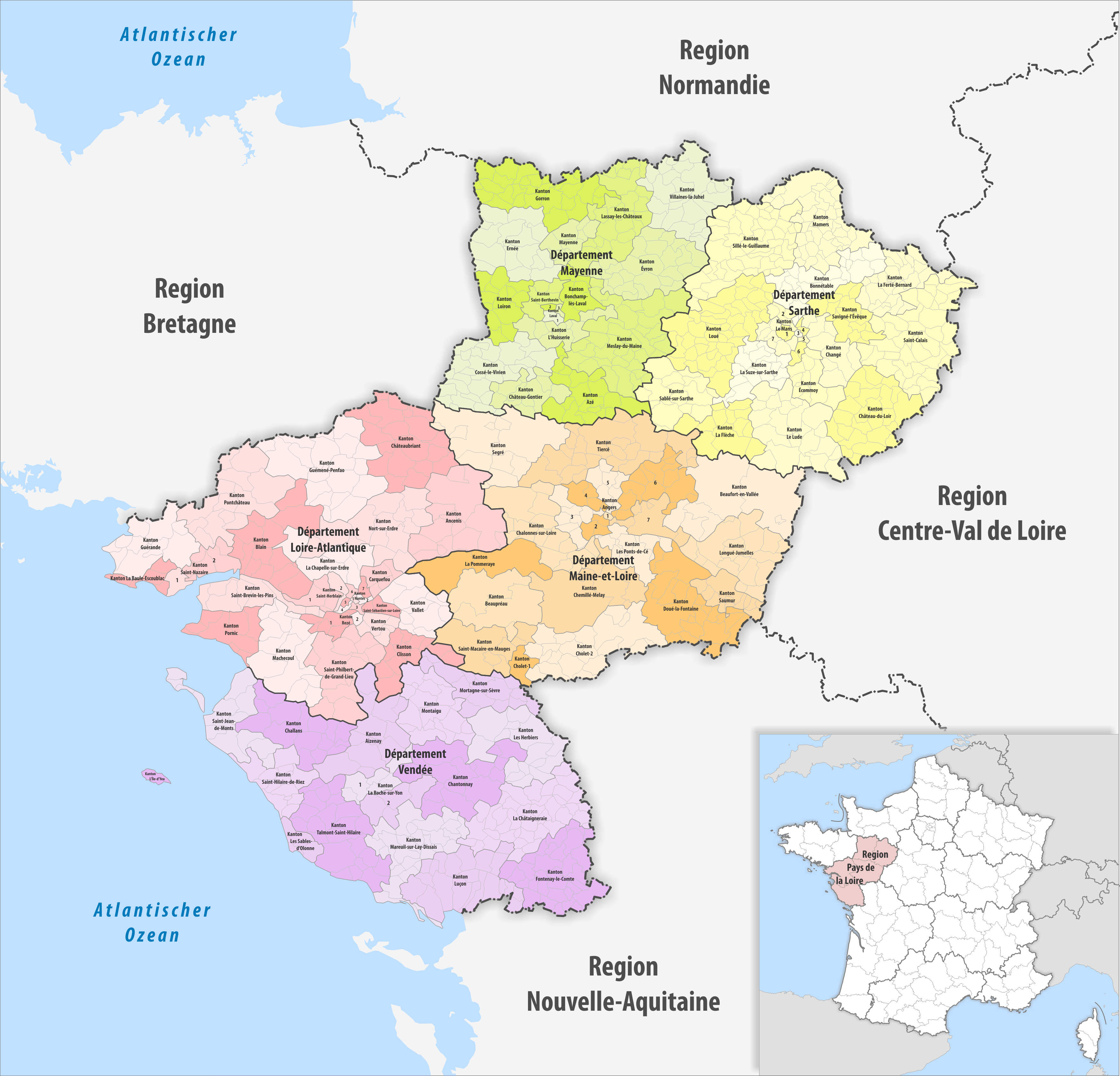 Gemeinden, Kantone und Departemente in der Region Pays de la Loire